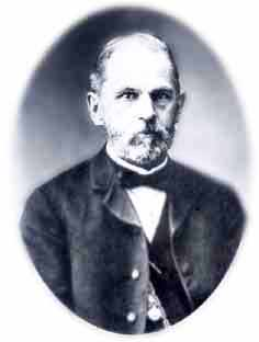 Найдёнов Николай Александрович, краевед, банкир (Москва, кон.XIX века)